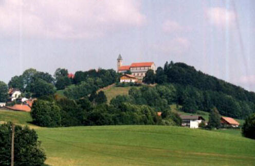 Wollaberg